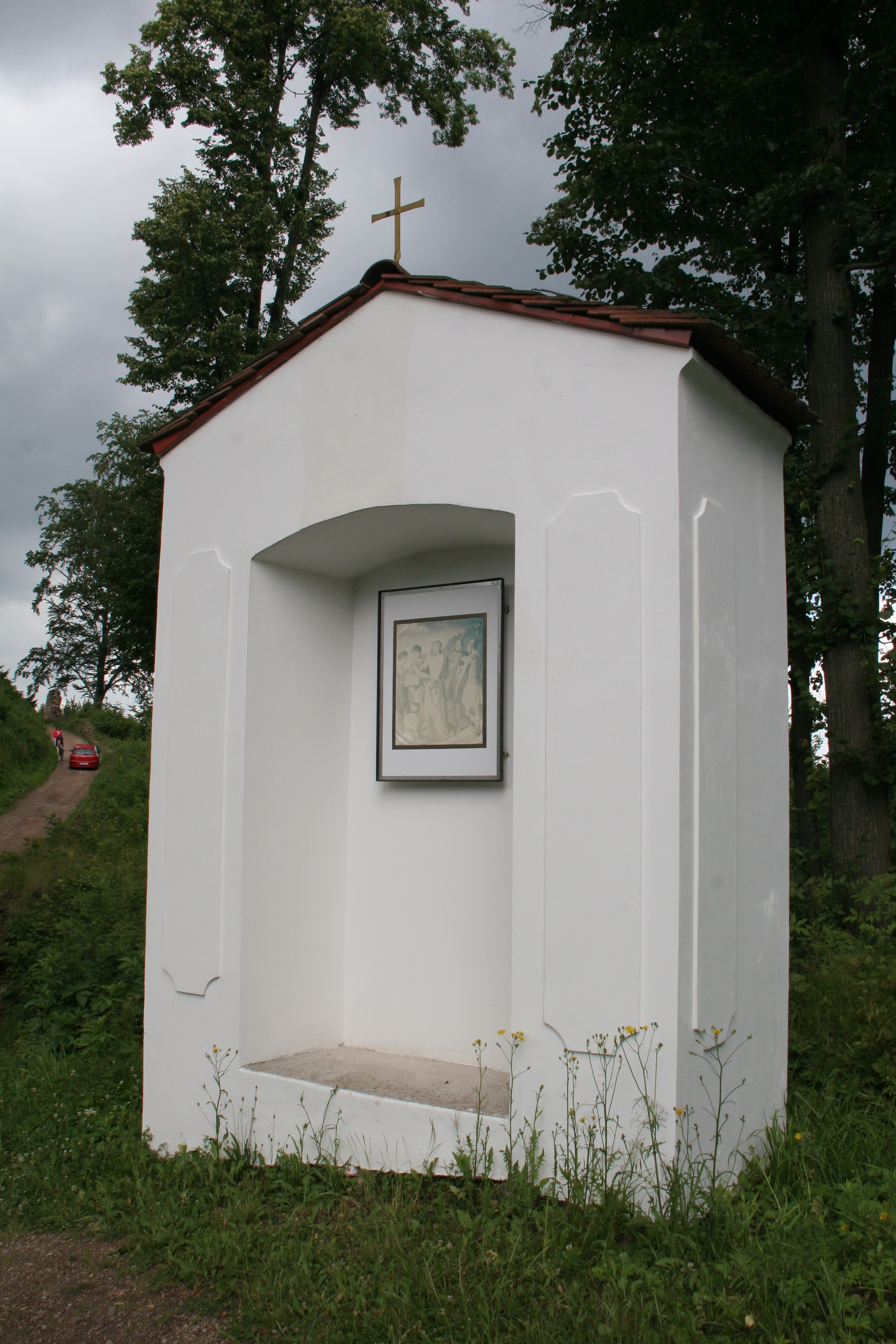 Hrad Potštejn, zřícenina, Potštejn.